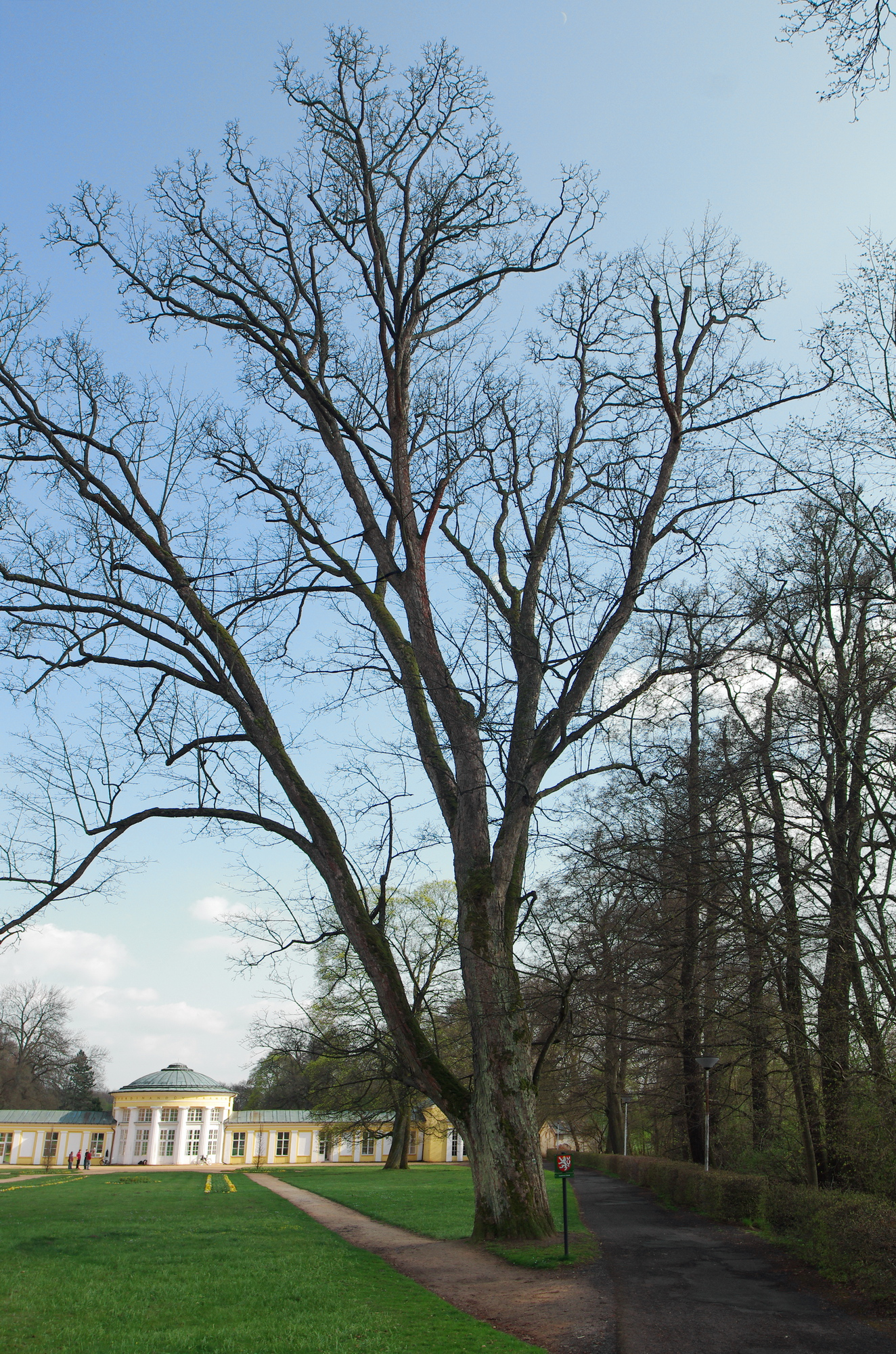 Památný strom Javor u Ferdinandova pramene, Mariánské Lázně, okres Cheb